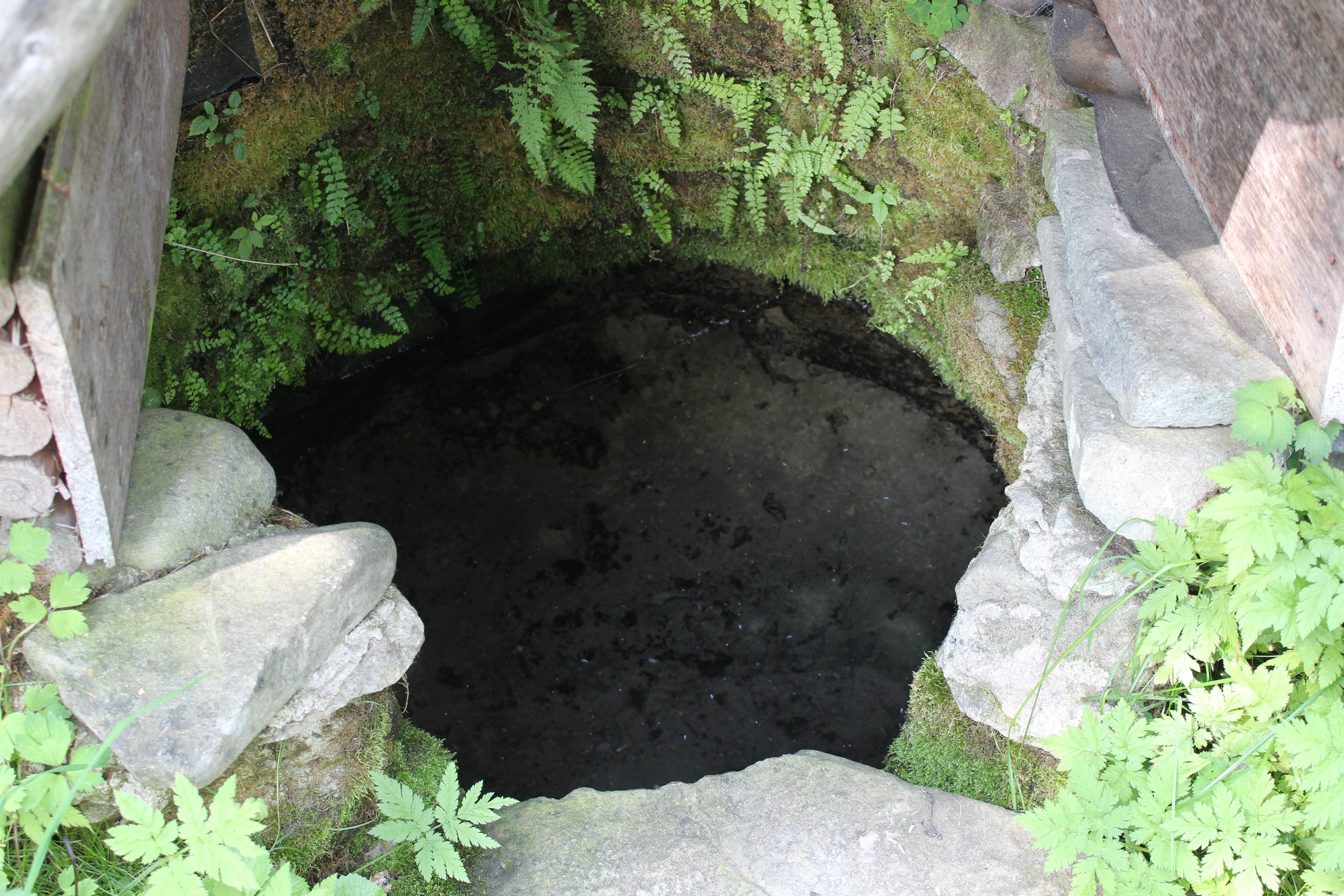 Królewska Studnia (Beskid Sądecki)